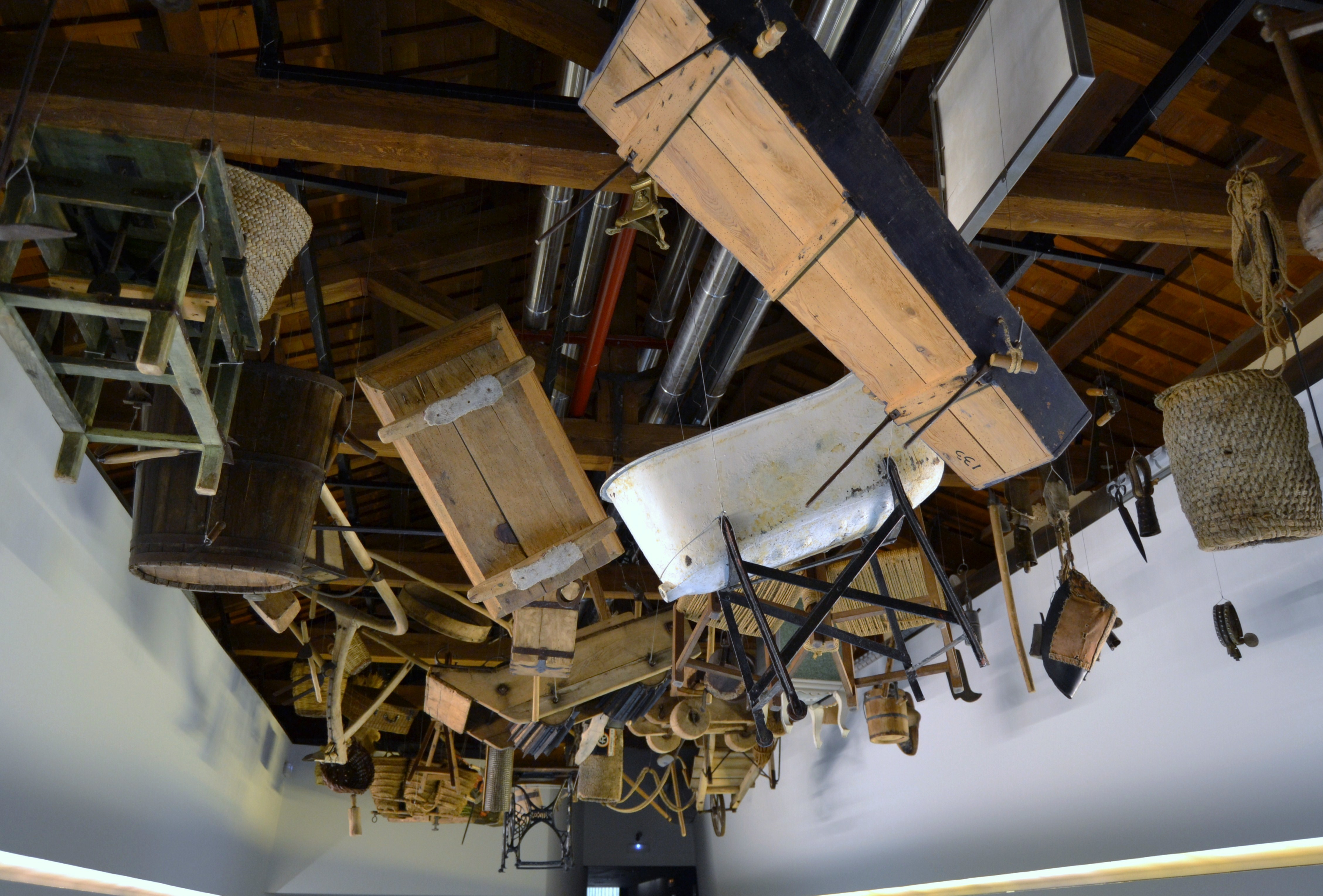 Objectes penjats, museu Valencià d'Etnologia.